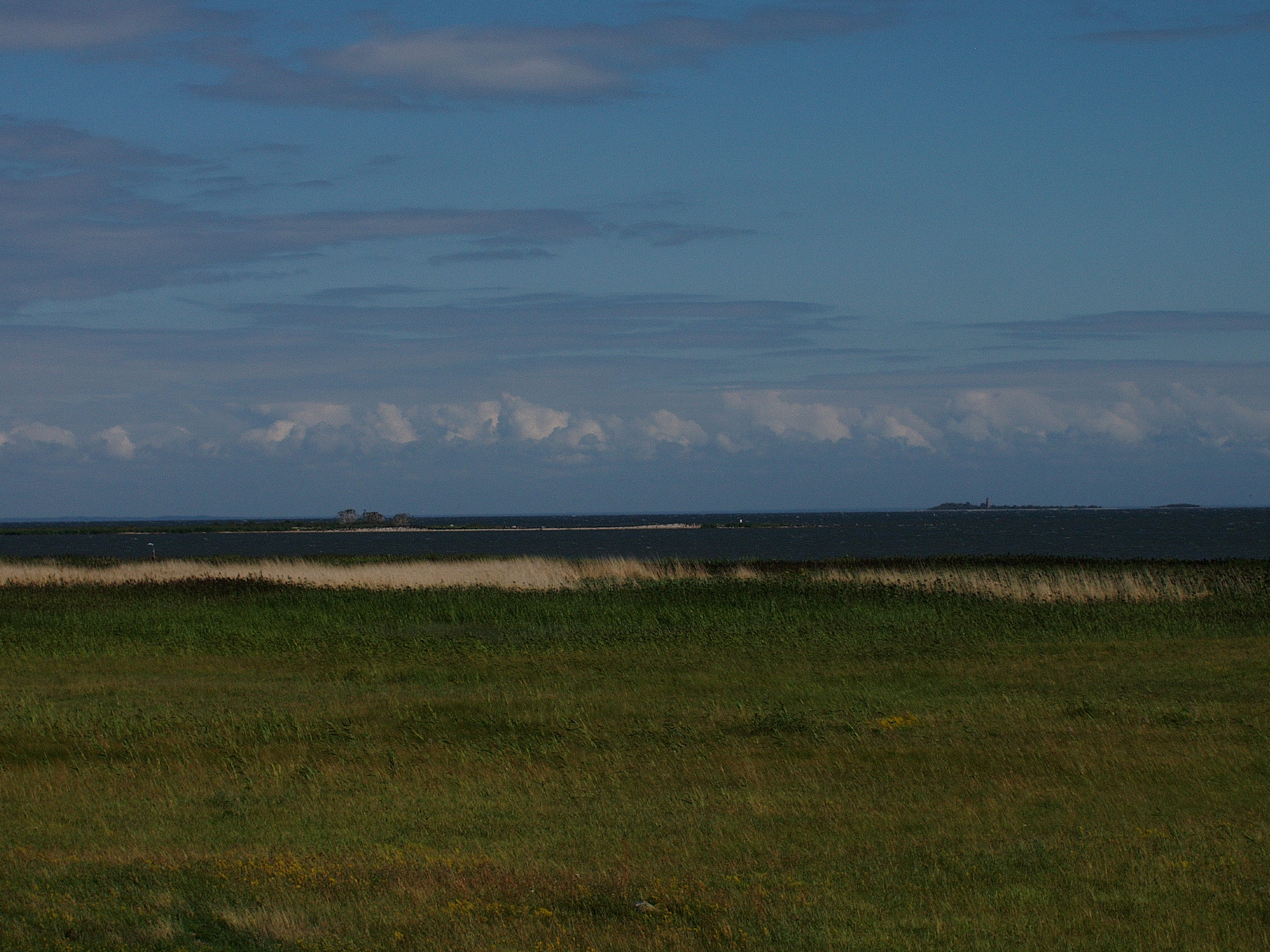 Lähem saar on Annilaid ja kaugemal paistab Sorgu. Pildistatud Manilaiult.